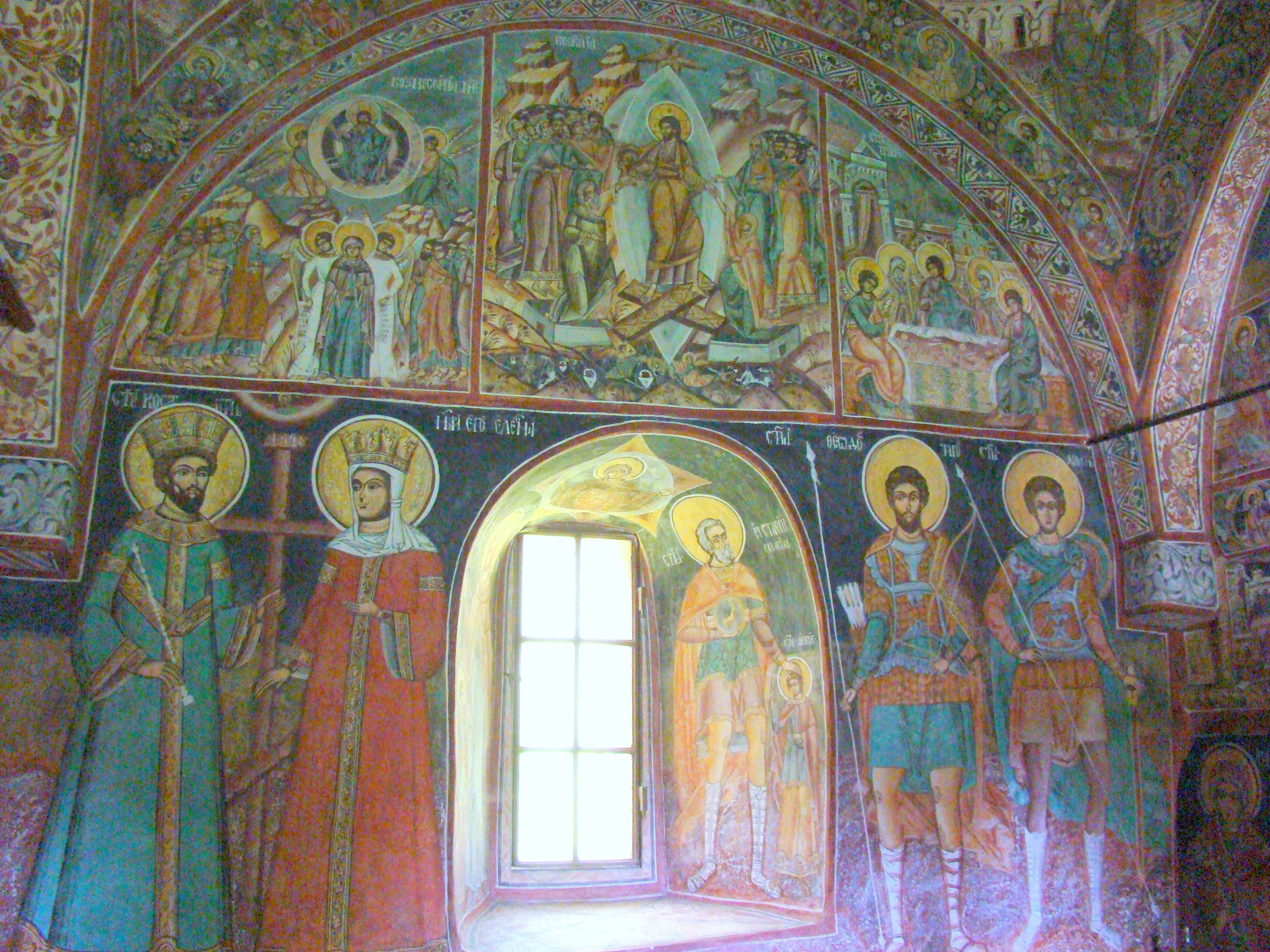 Bolnița Sf.Nicolae, Mănăstirea Polovragi, județul Gorj